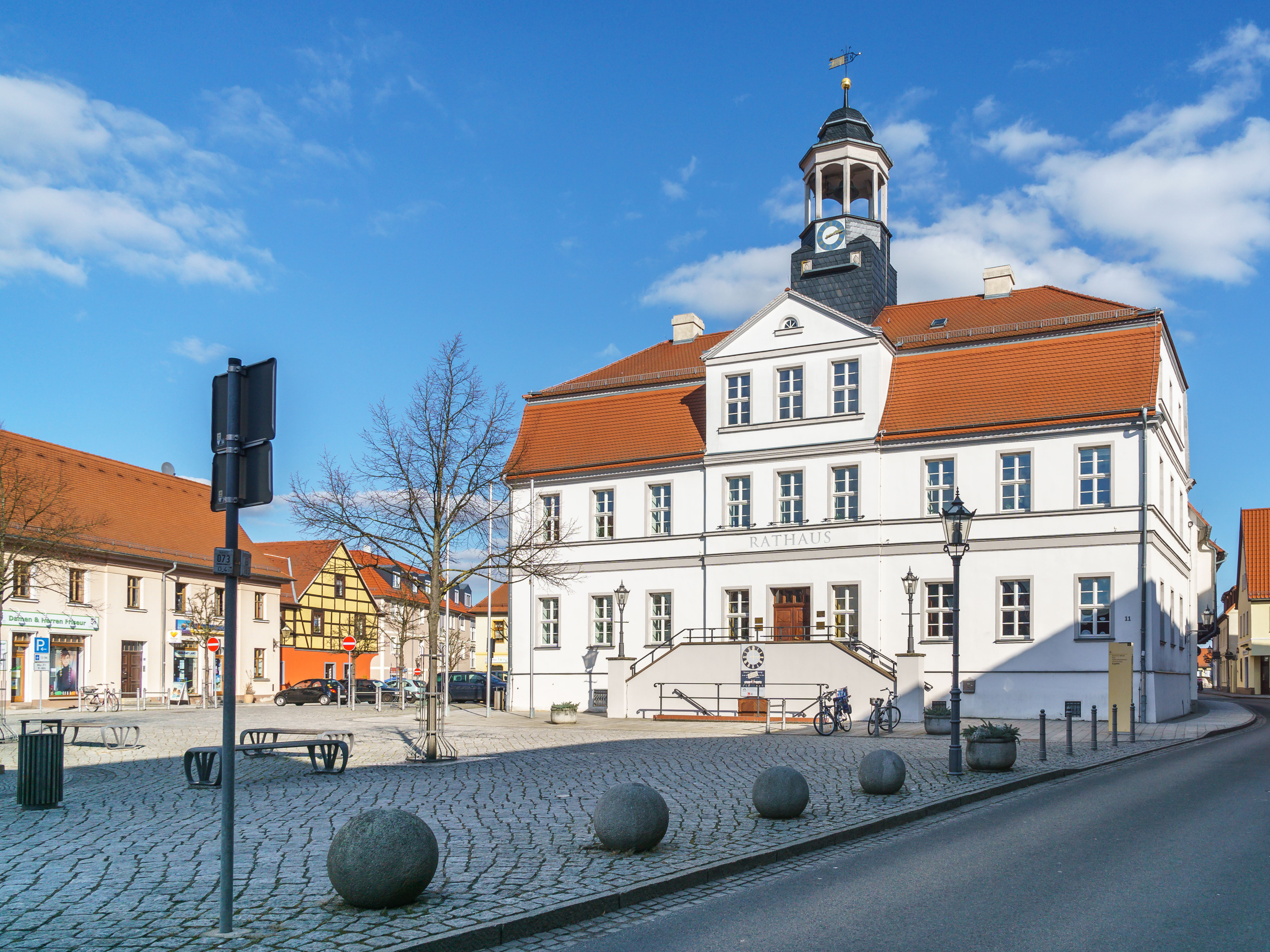 Rathaus, Markt 11 in Bad Düben